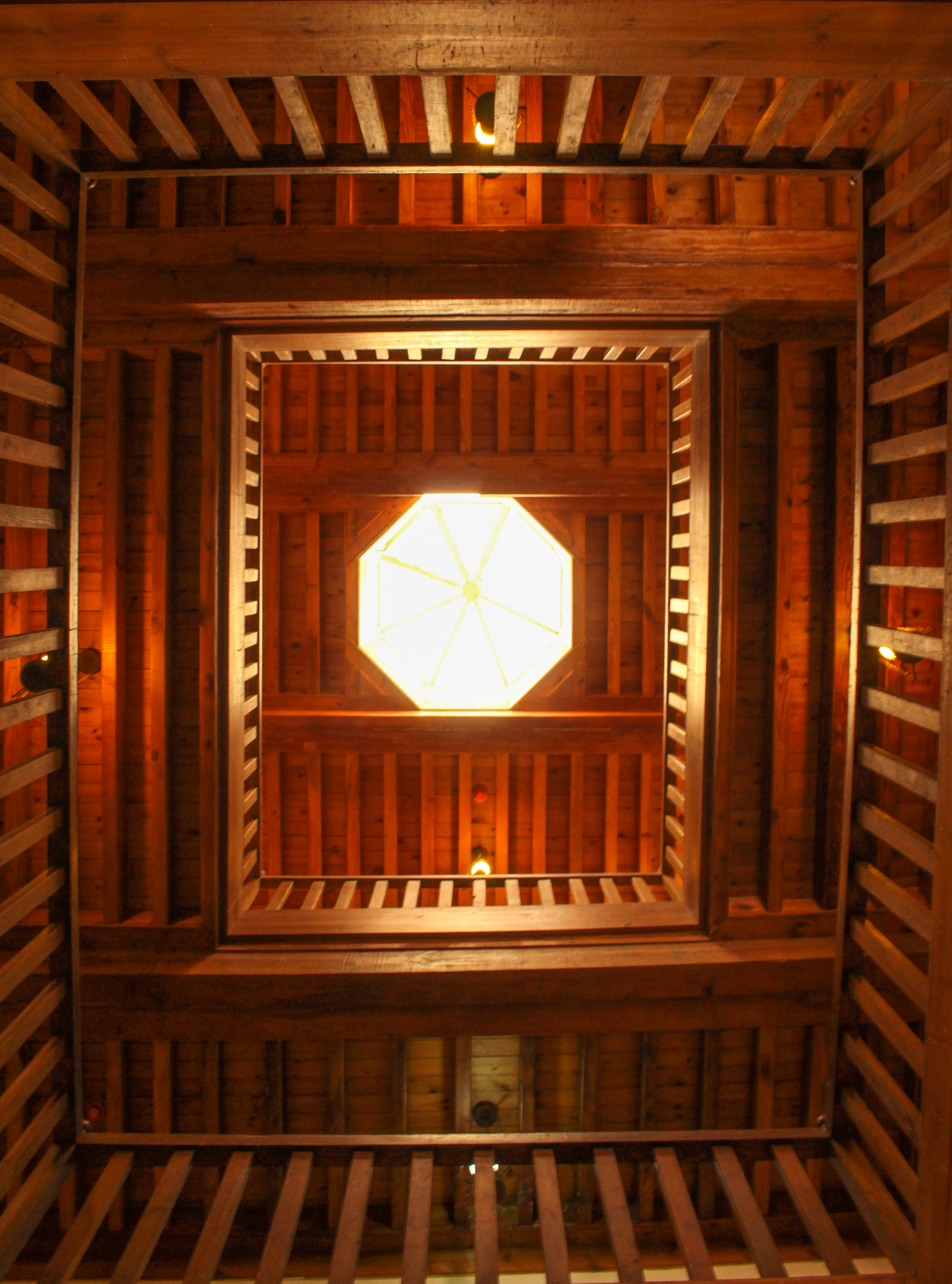 سقف منزل الميزونى فى مدينة رشيد